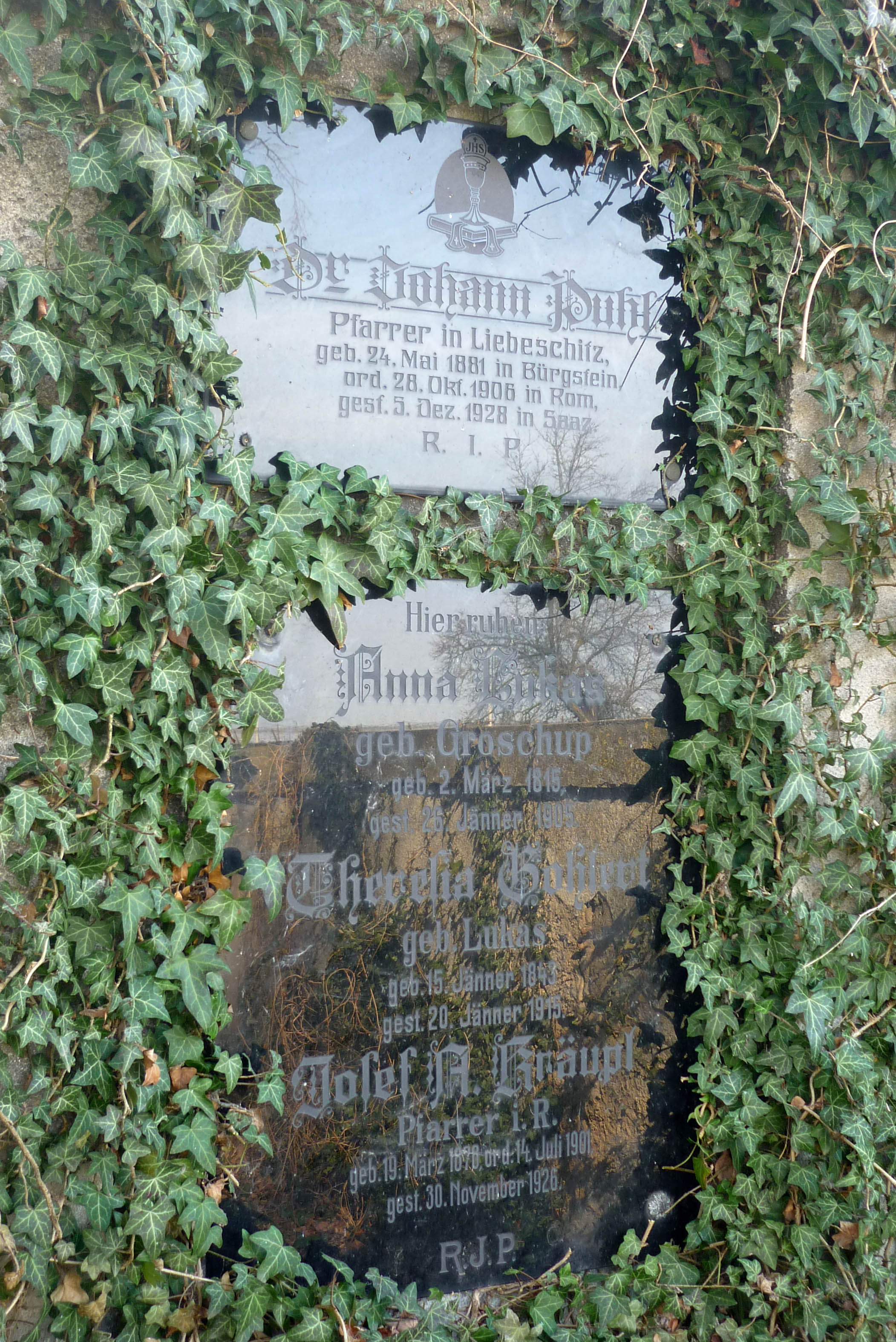 Grab des Pfarrers Dr. Johann Puhl (* 24. Mai 1881 in Bürgstein, † 5. Dez. 1928 in Saaz) auf dem Friedhof in Liebeschitz (Liběšice)